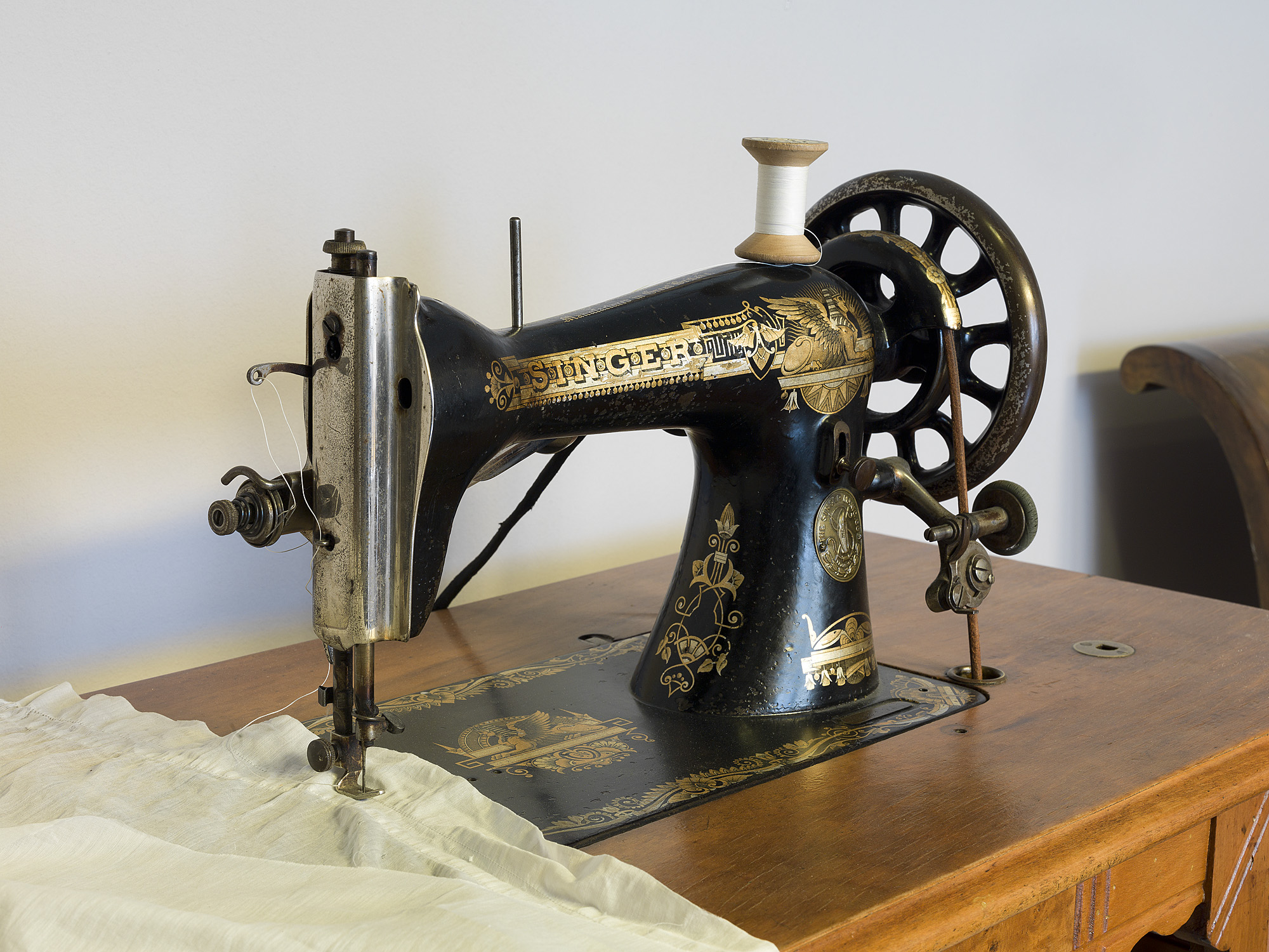 Obra de la col·lecció de la Casa Masó de Girona